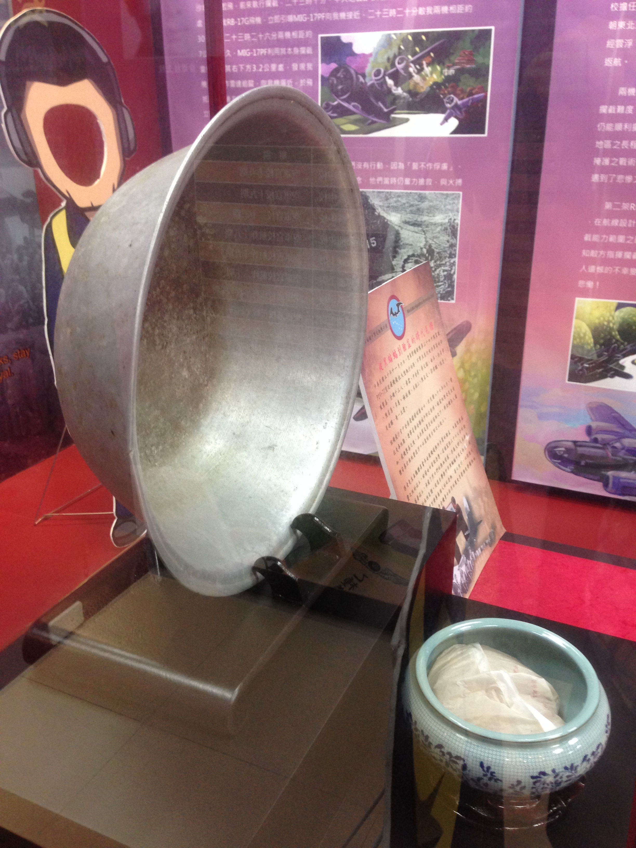 中文（台灣）: 金鼎遺孀楊昭蓀所出借臉盆